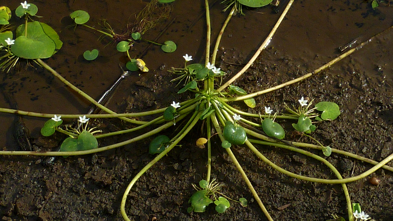 Nymphoides indica (L.) Kuntze